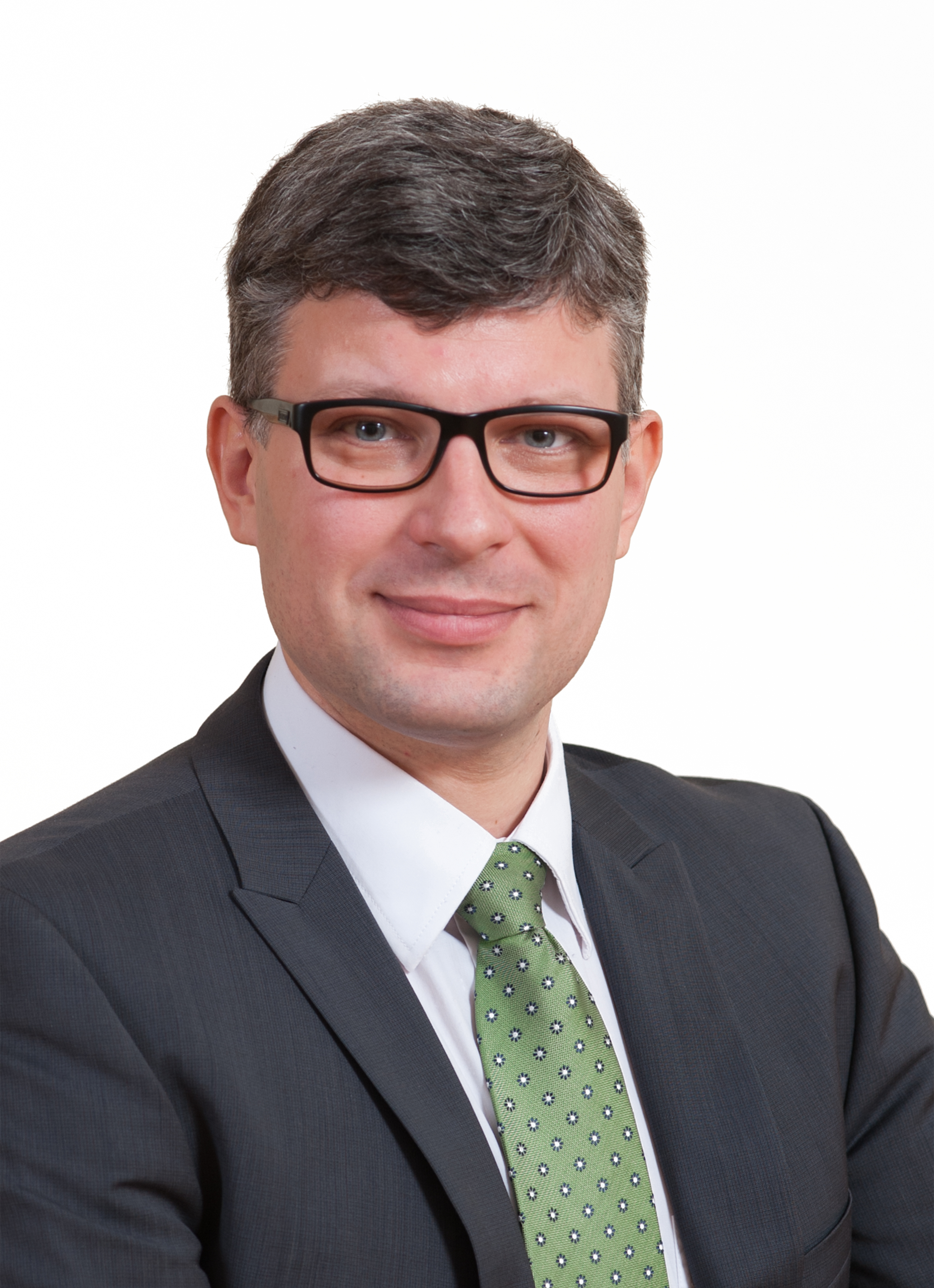 Mihhail Korb